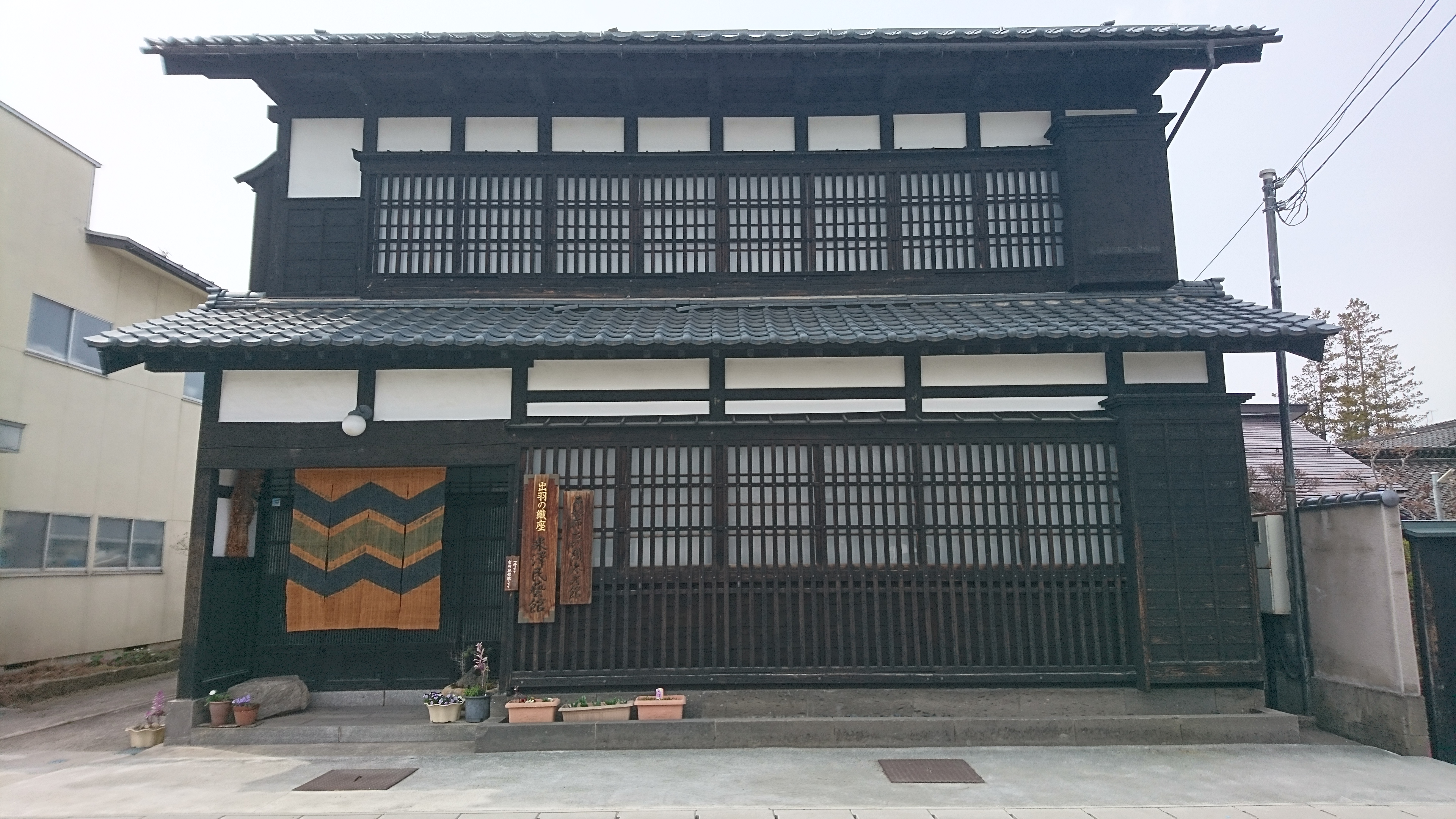 山形県米沢市門東町1丁目1-16に所在する自然布の私設資料館